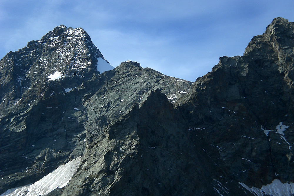 Erzherzog Johann-Hütte auf der Adlersruhe auf 3.454 m (Unser Quartier nach dem 3. Tourtag) Copyright: Gerhard Kaiser ( (